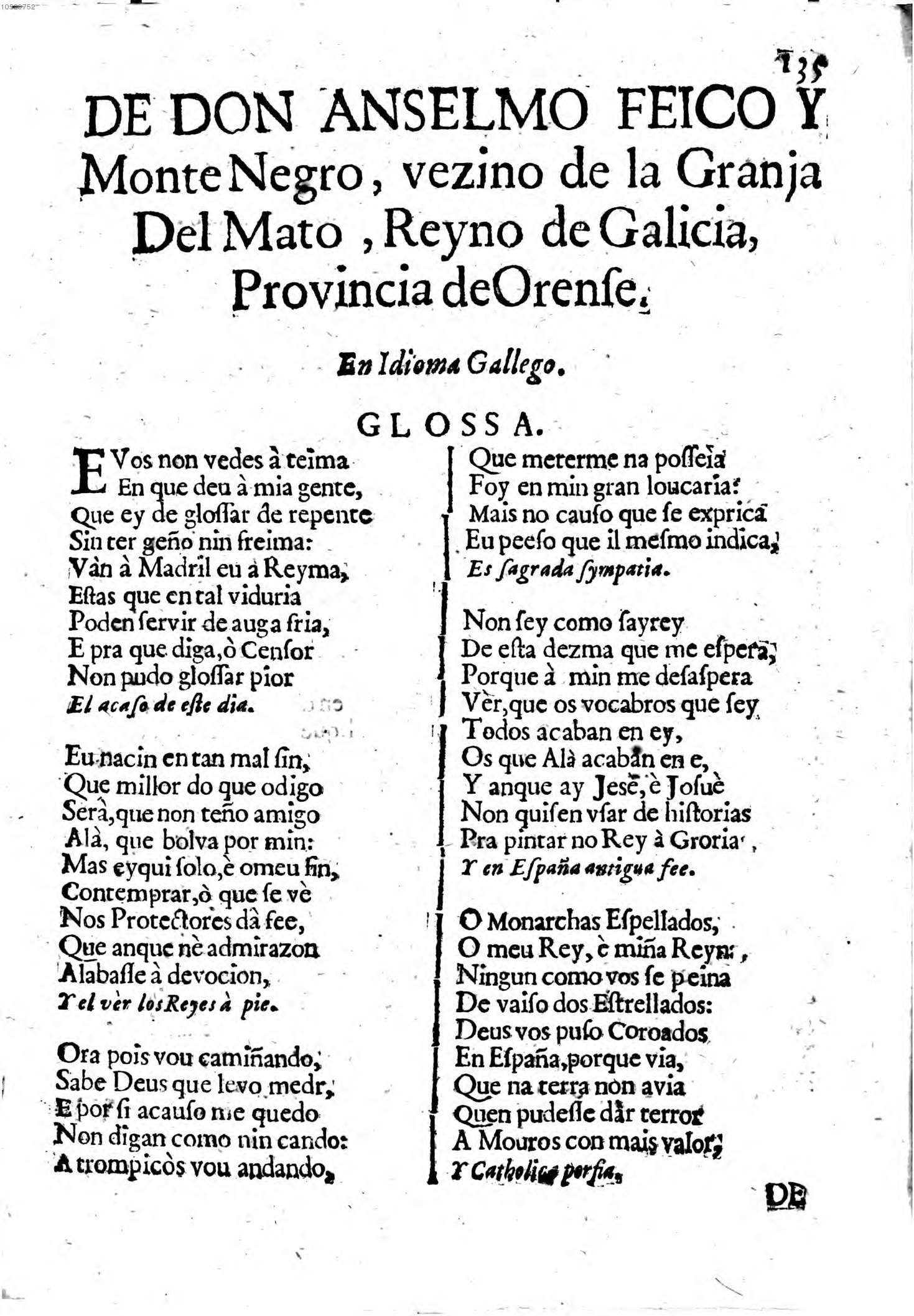 "¿E vós non vedes a teima?"". In Alvaro Bazàn Benavides (1723). Sagradas flores del Parnasso, consonancias metricas de la bien templada lyra de ApoloJuan de Ariztia. Madrid.